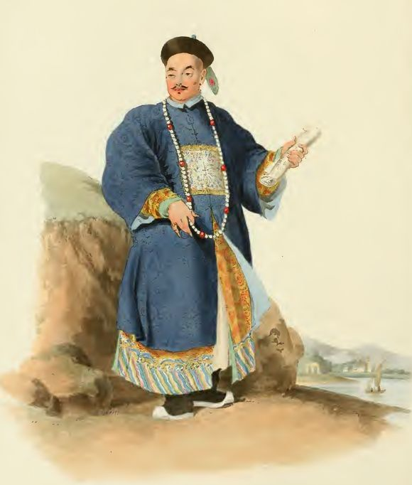 乾隆晚期的官員